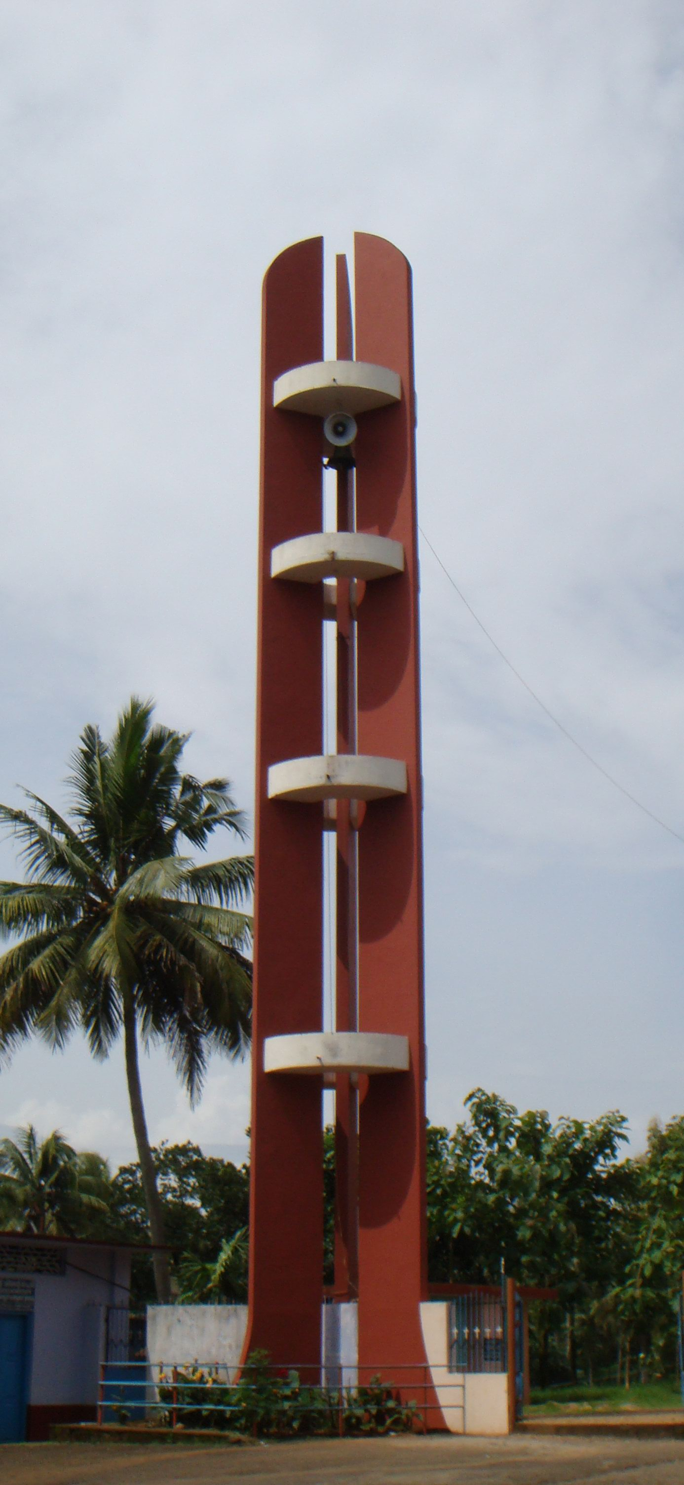 Bell tower in Muthalakodam church, Thodupuzha Town, Idukki district